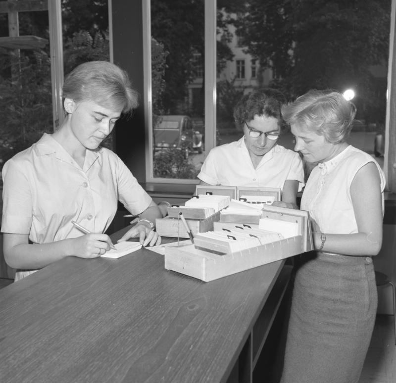 Deutsche Bibliothek Frankfurt/Main